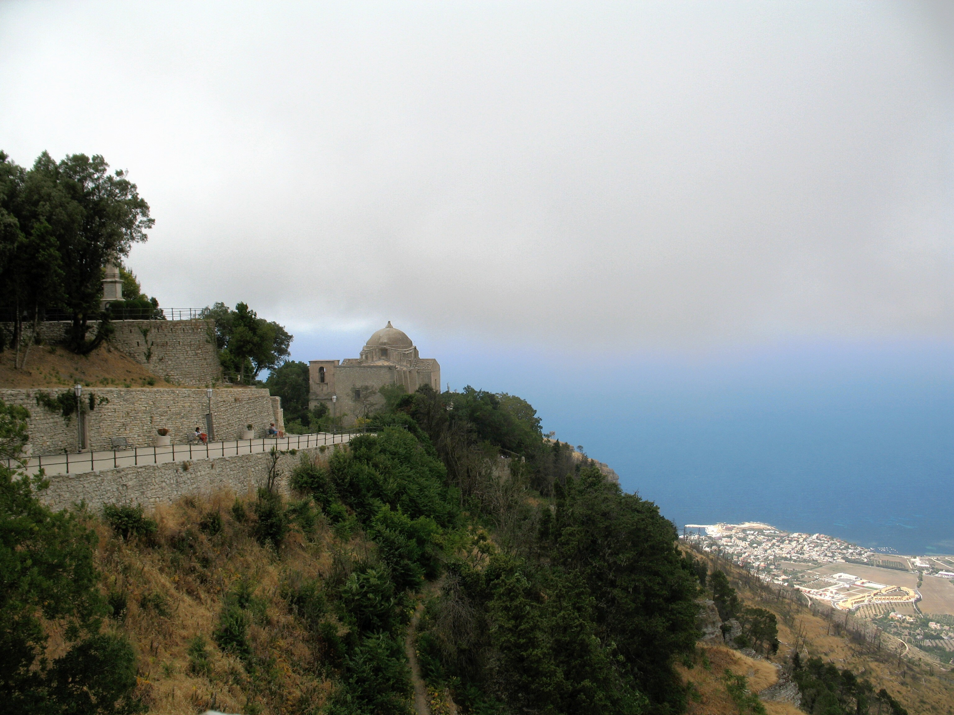 Kostel San Giovanni Battista a rozhraní oblačnosti nad městem